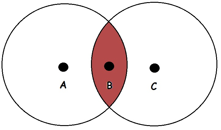 dos nodos ocultos